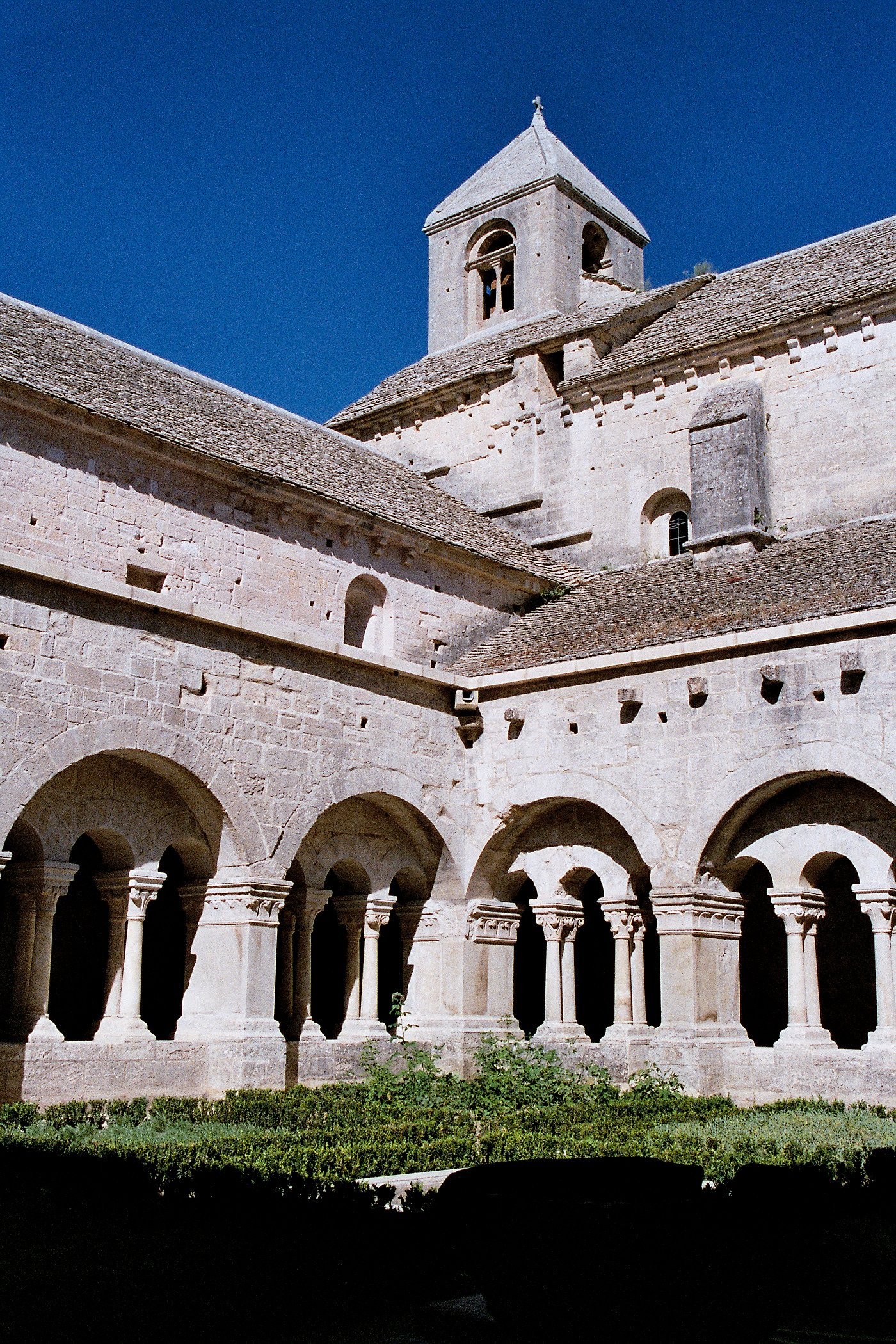 El claustro Abbaye de Sénanque, Gordes, cloister. Aut. : Greudin, 2003 Lic.